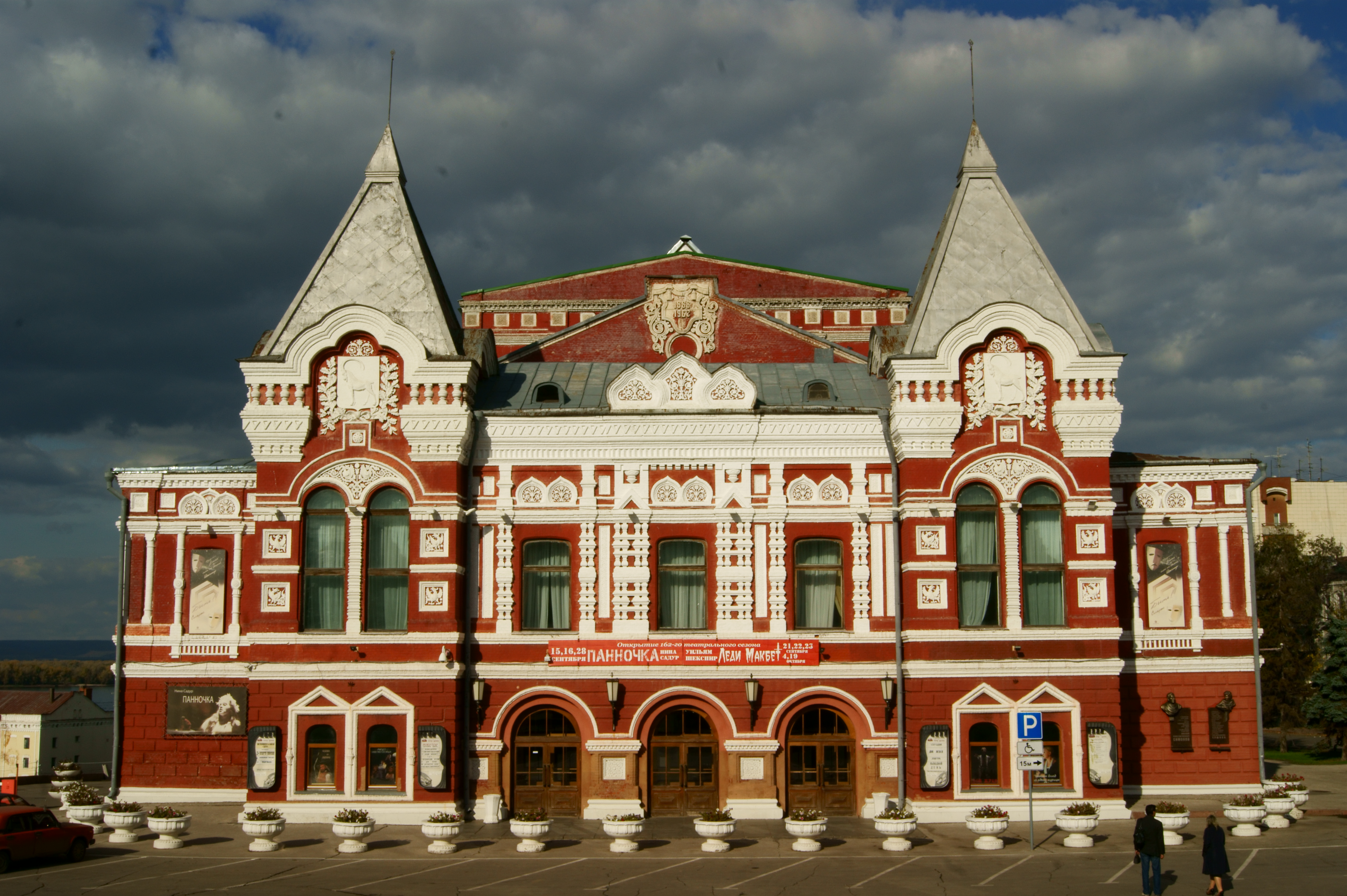 Очень удачно скопились облака над зданием.